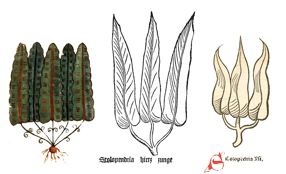 Abbildung von Asplenium scolopendrium